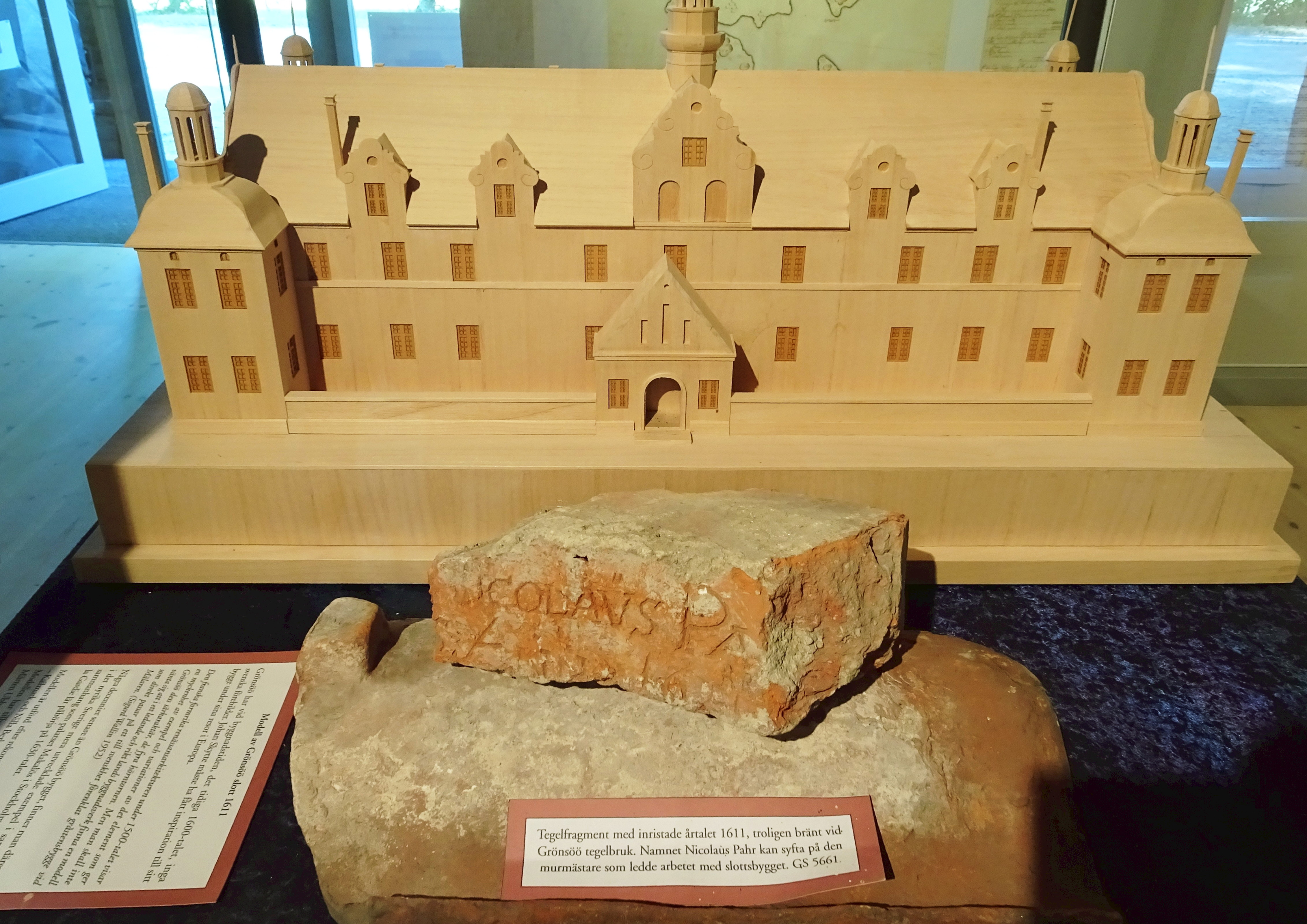 Grönsö slott, modell